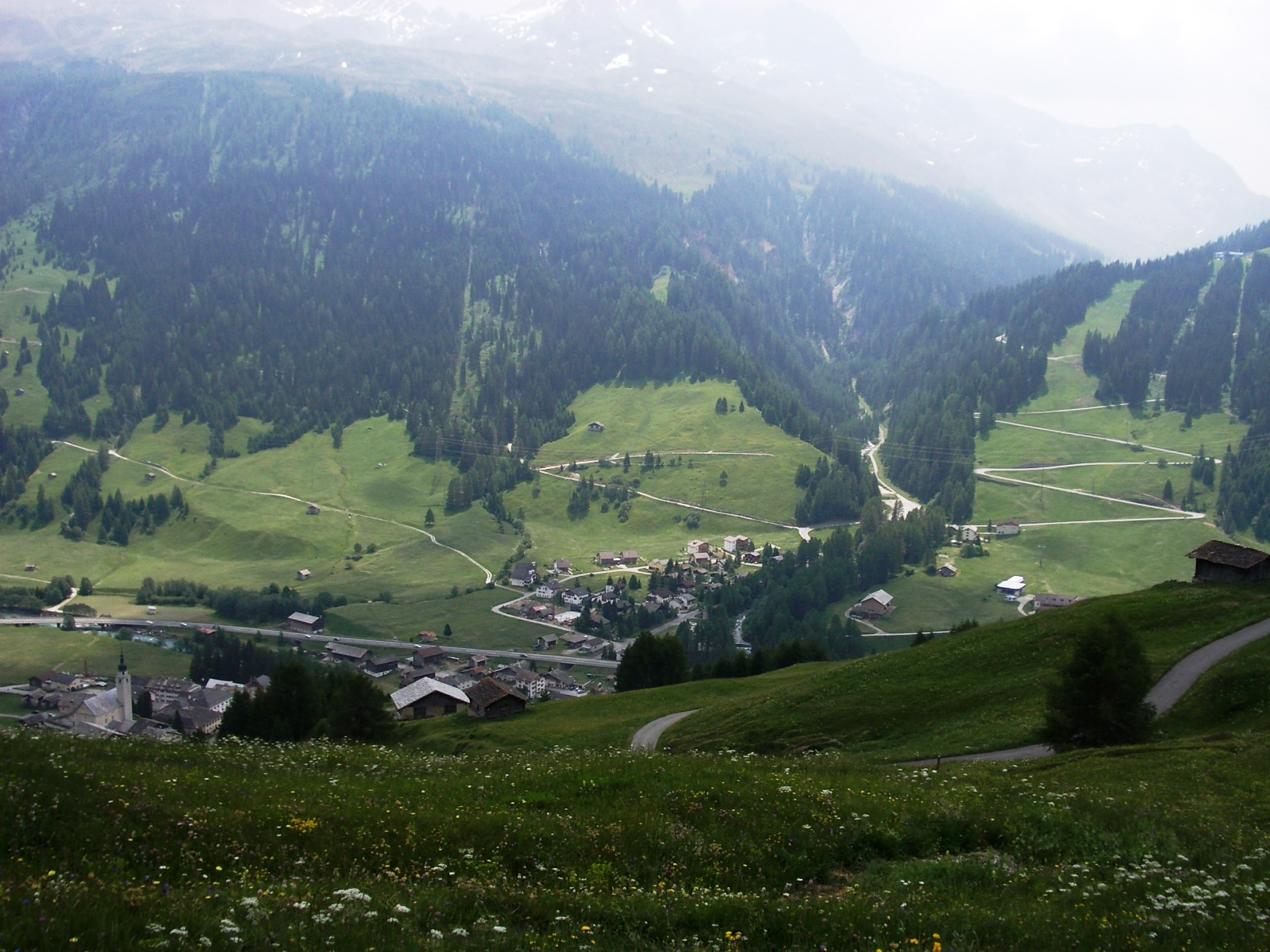 Splügen GR, Switzerland self-made, June 2006